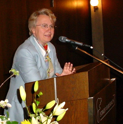 Annette Schavan auf einer Wahlkampfveranstaltung der CDU in Biberach an der Riß.